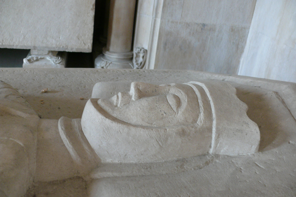 Beatrix Kastilská, portugalská královna